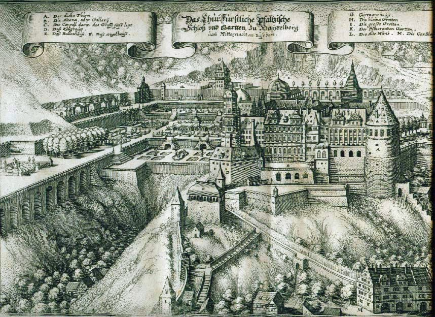 Heidelberg palace. Copper engraving.